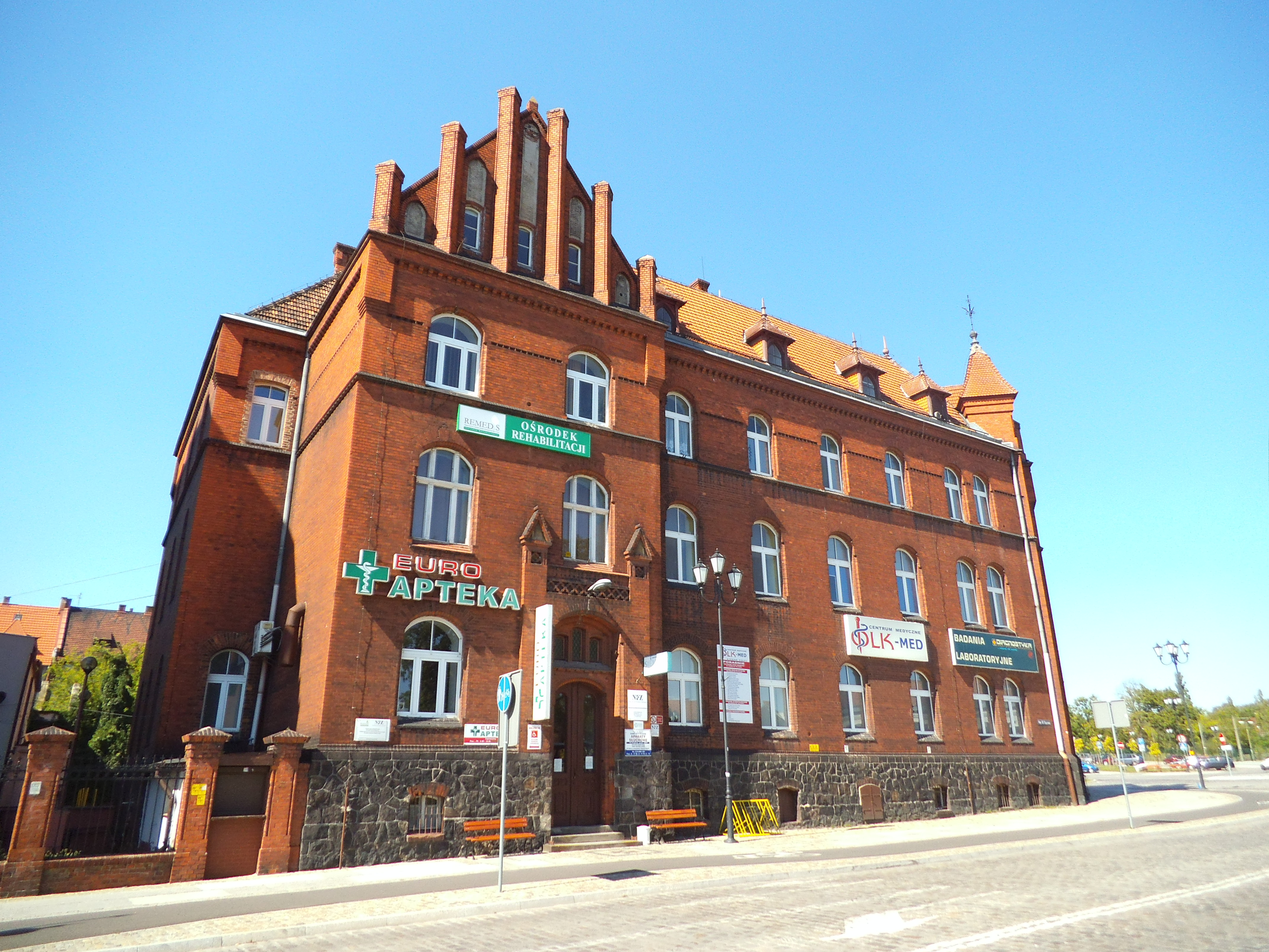 Dawna siedziba Inspektoratu Kolei Królewskiej w Toruniu4